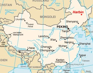 Charbin (Harbin) zvýrazněný na mapě ČLR.